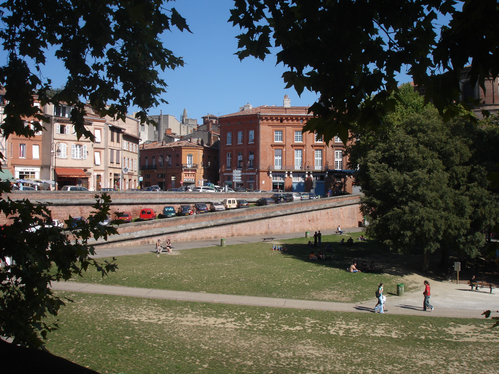 Toulouse (Haute-Garonne, France) : Le port de la Daurade.